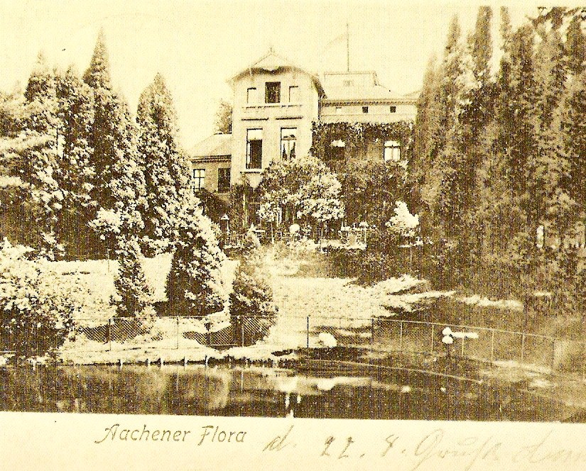 Scan einer alten Aachener Ansichtskarte aus dem eigenen Besitz